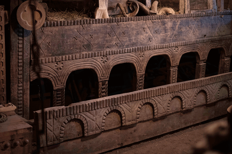 Ausschnitt aus dem stockbettartigen Holzaufbau eines Machubi in Oberswanetien zur Beherberbung von Nutzvieh und Menschen.